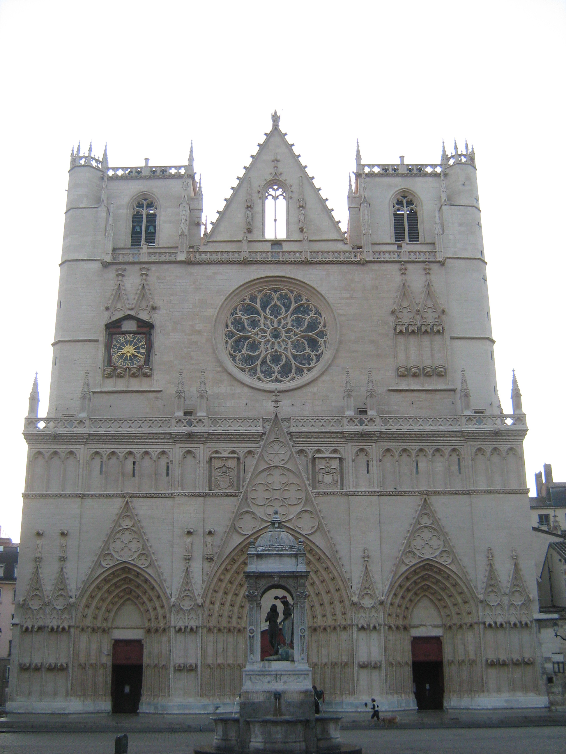 Façade restaurée de la Primatiale Saint-jean de Lyon